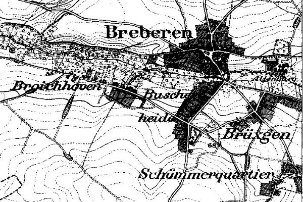 Neuaufnahme 1891-1912